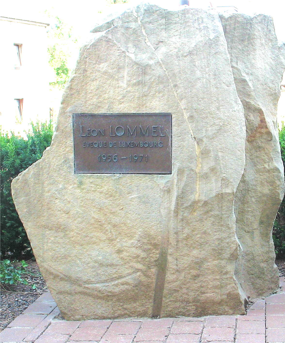 Monument fir de Bëschof Léon Lommel zu Kruuchten